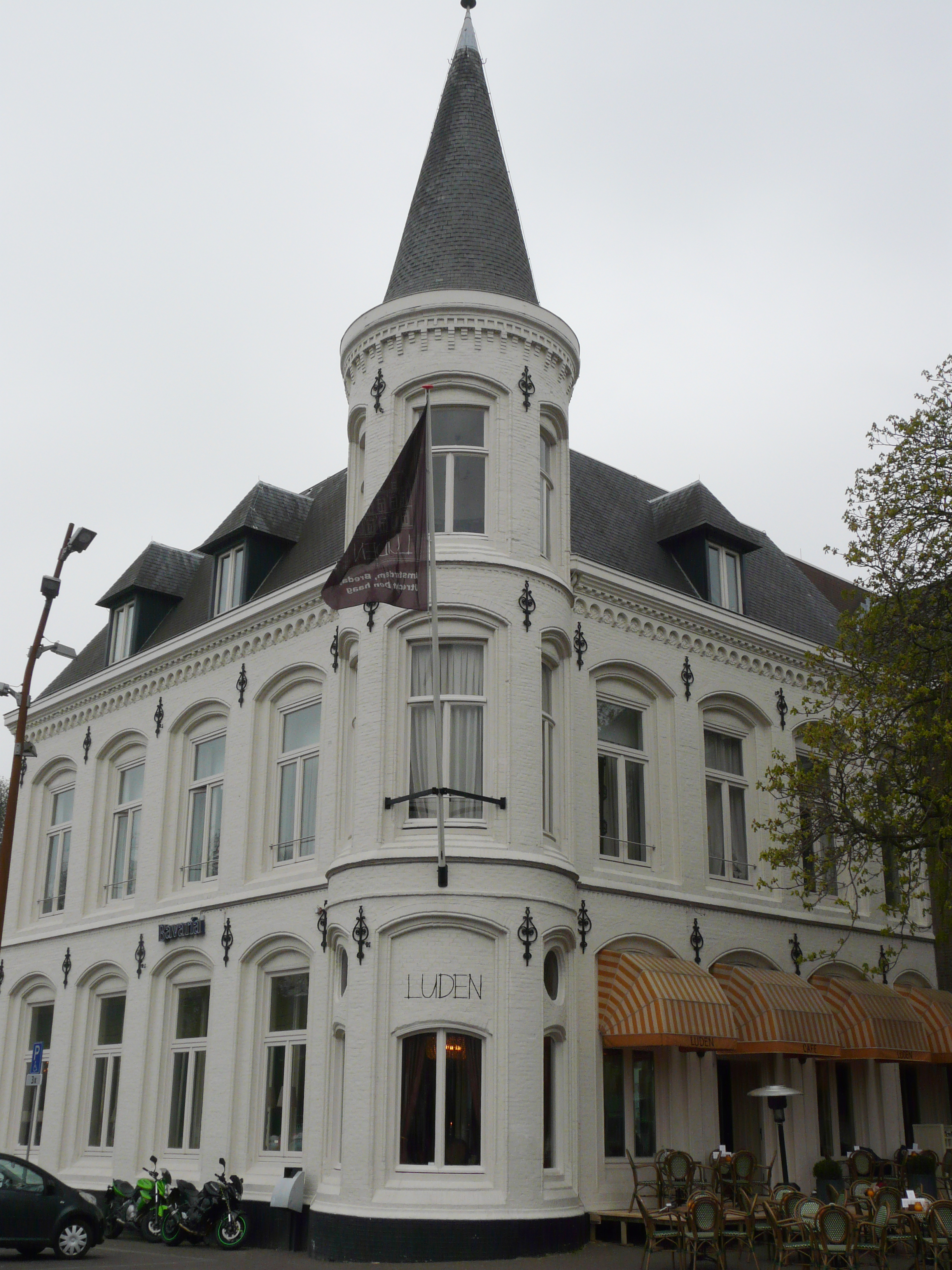 Zicht op het voormalige Oude Postkantoor gelegen nabij de haven van Breda en de Vismarktstraat. Gelegen in het centrum van Breda. Thans horeca-gelegenheid.